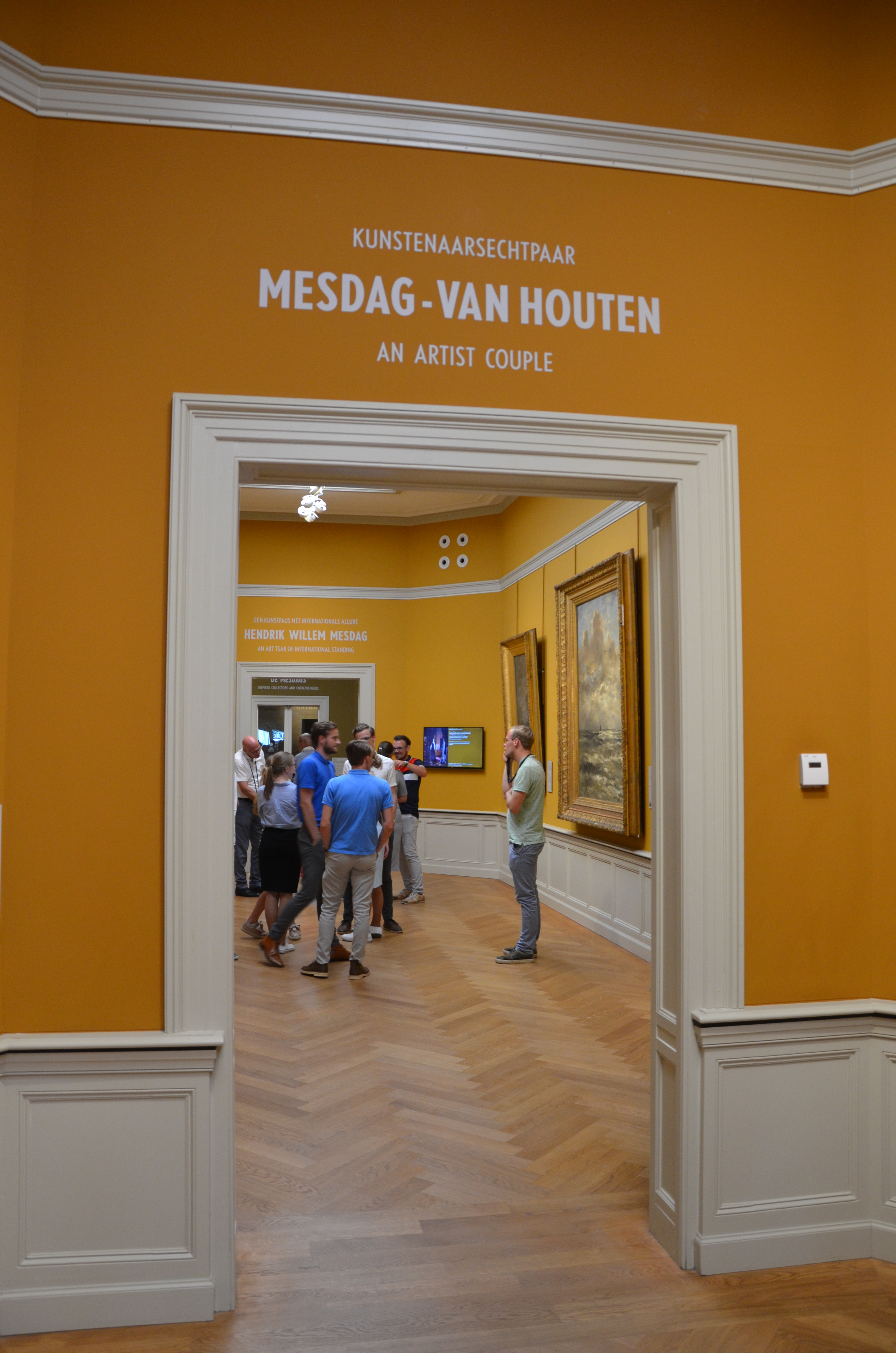 Een van de ruimtes in het museum rondom Panorama Mesdag in Den Haag.